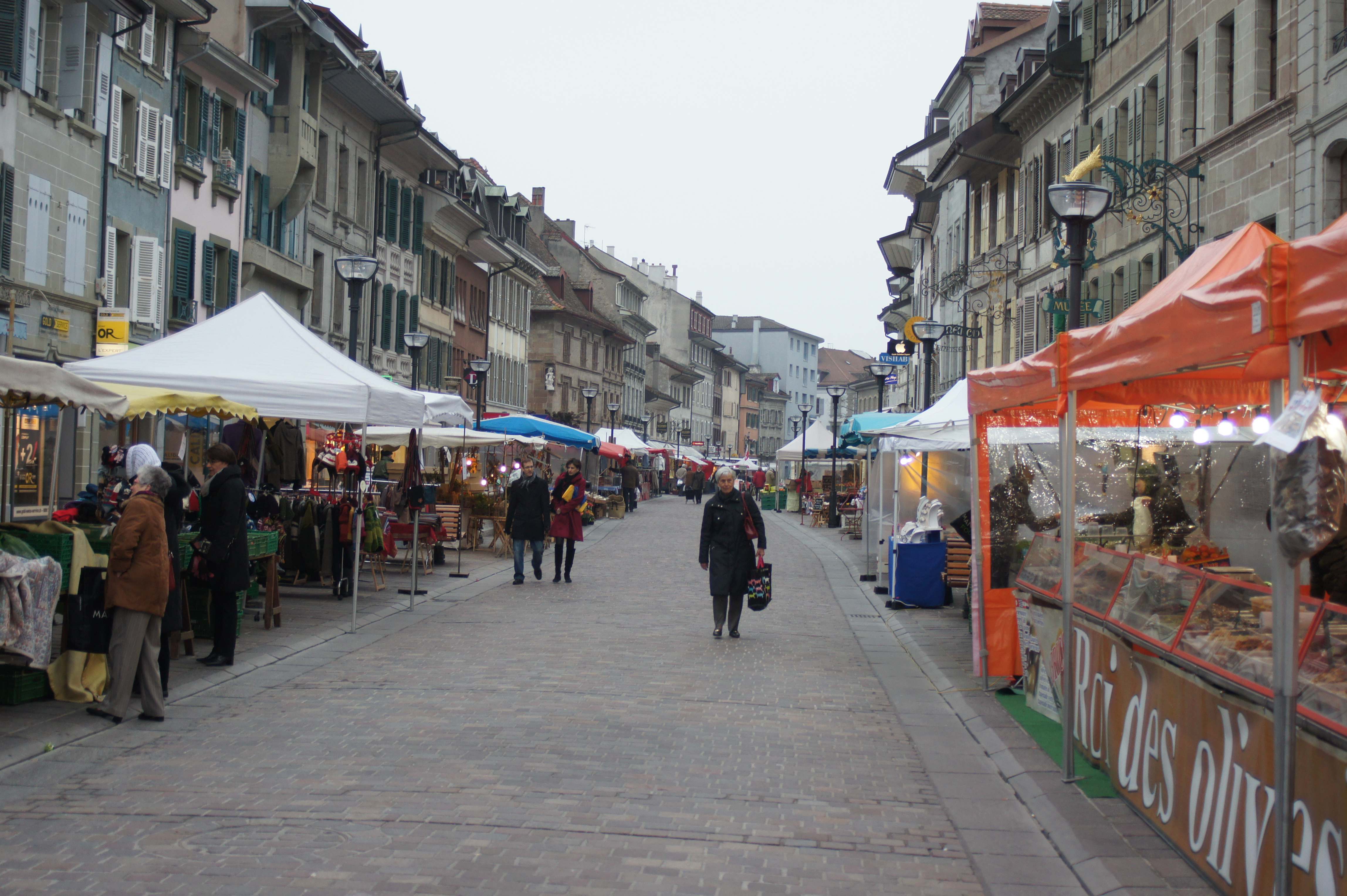 Marché de Morges, tôt en hiver